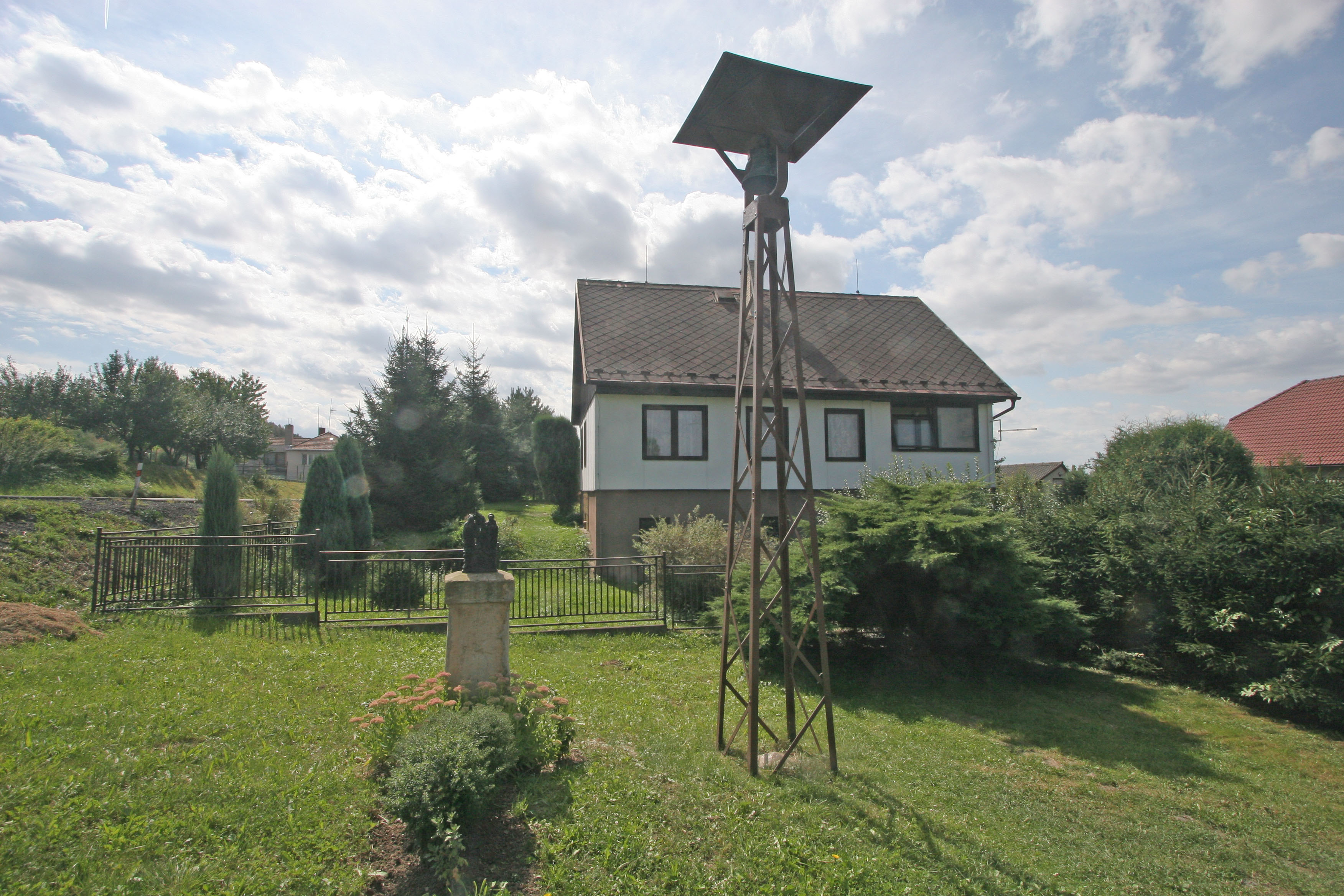 Podhořany zvonička